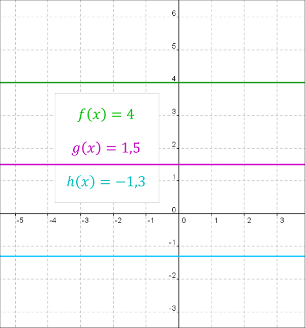 Vakiofunktioiden kuvaajia.